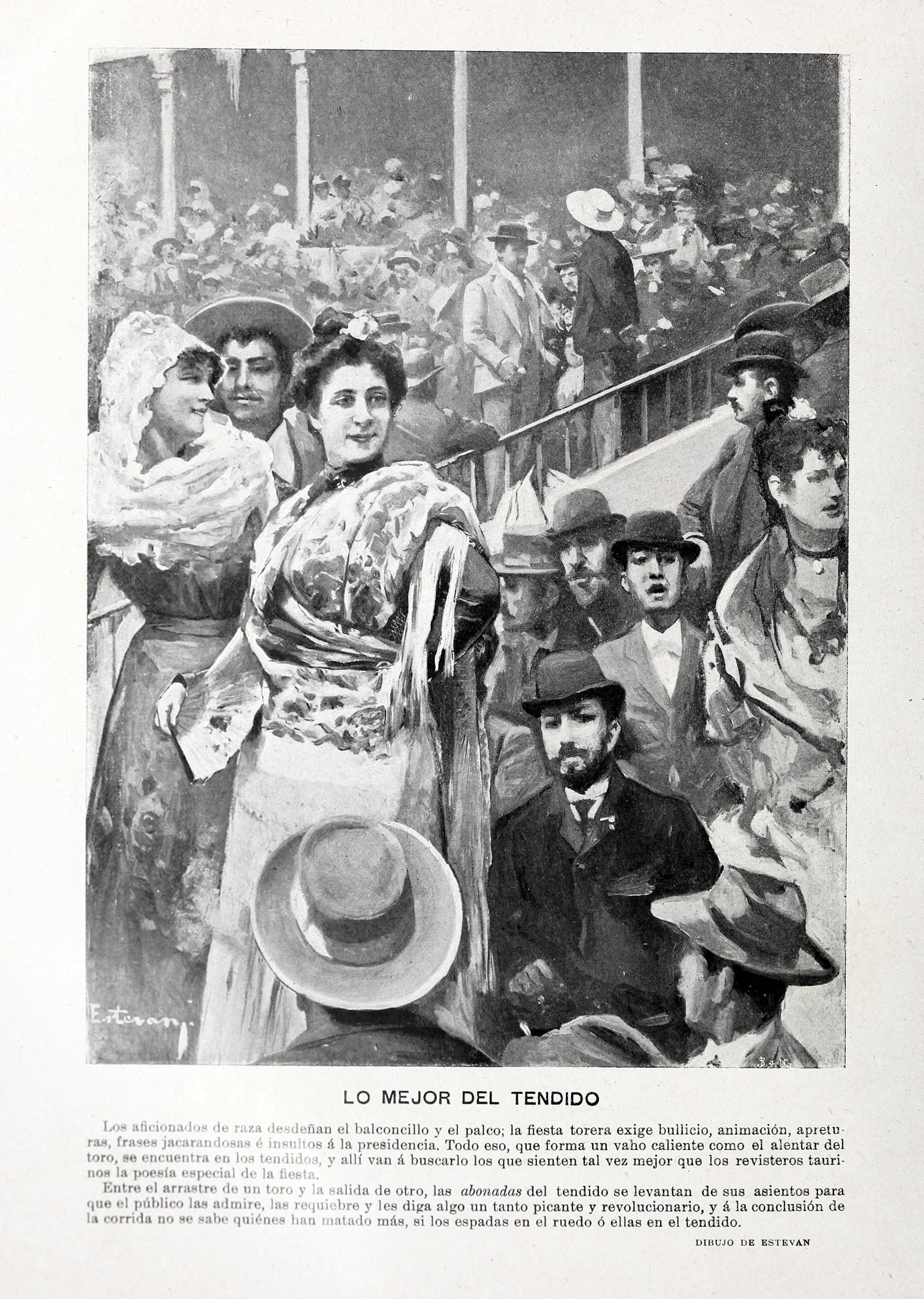 Lo mejor del tendido.